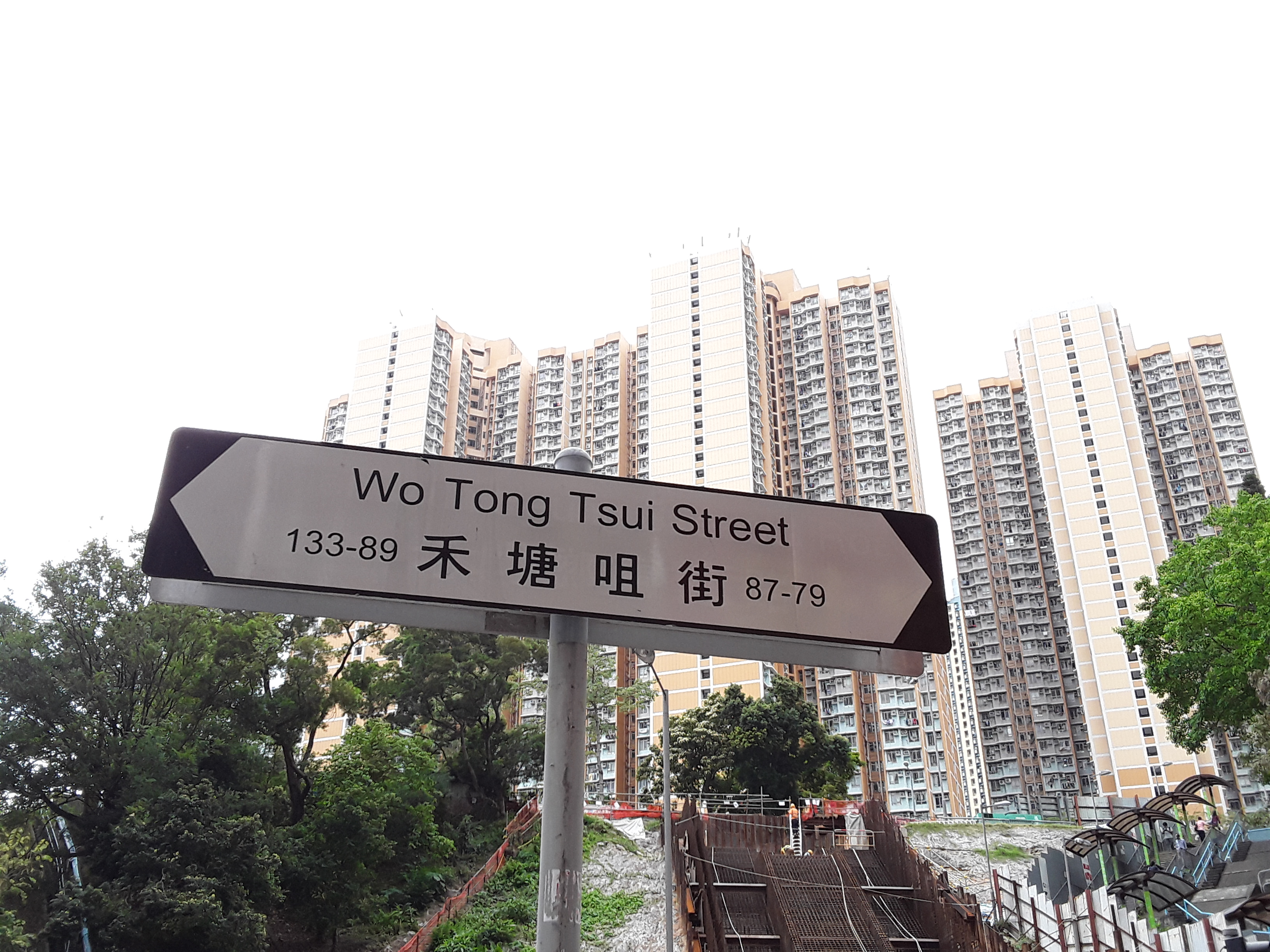 攝於葵興路與禾塘咀街交界